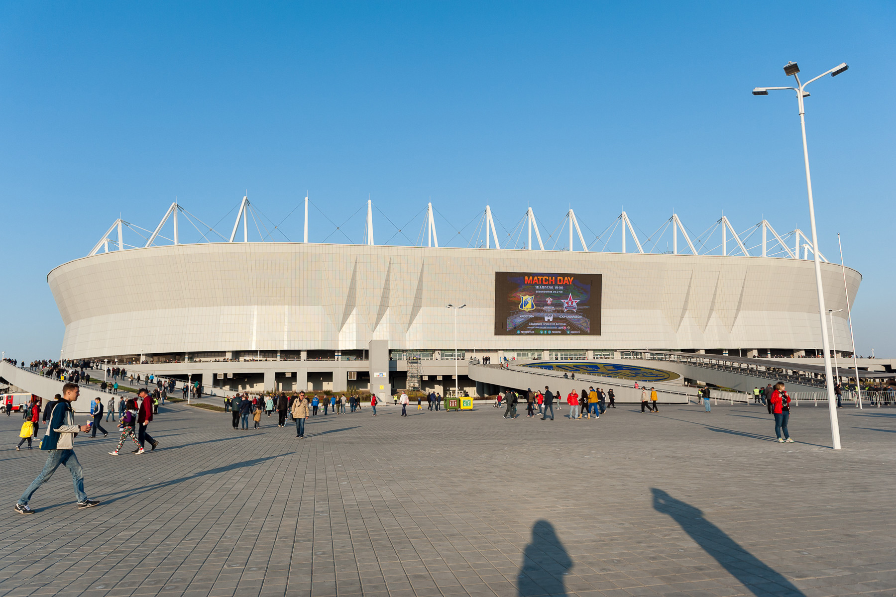 «Ростов» провел первый матч на новой арене